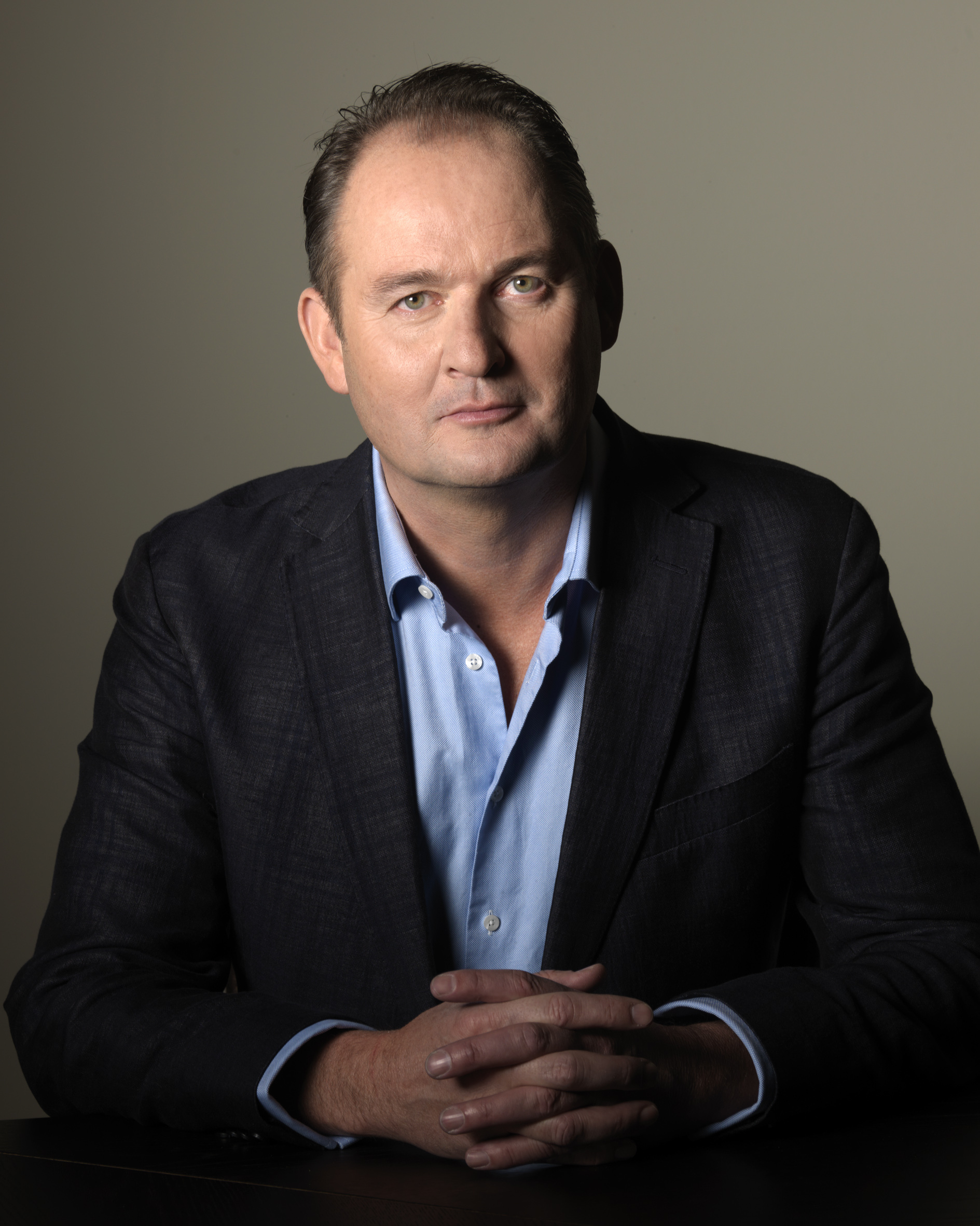 Nederlands beurscommentator voor RTL-z